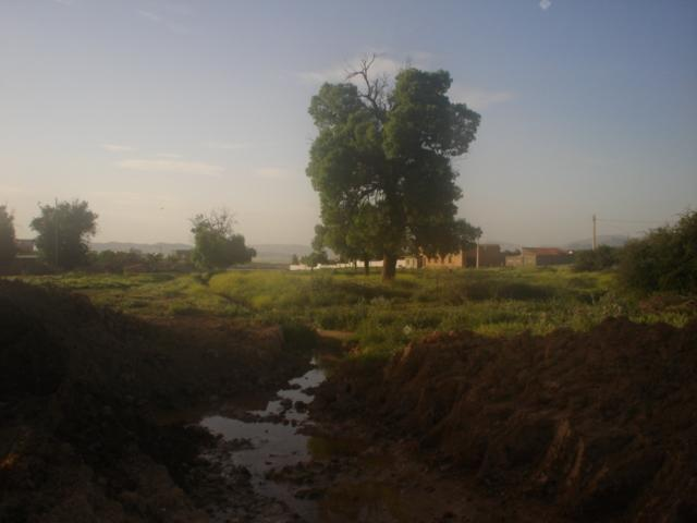 منظر شمال مدينة عين ياقوت بمحاذاة منبع ثاقوث